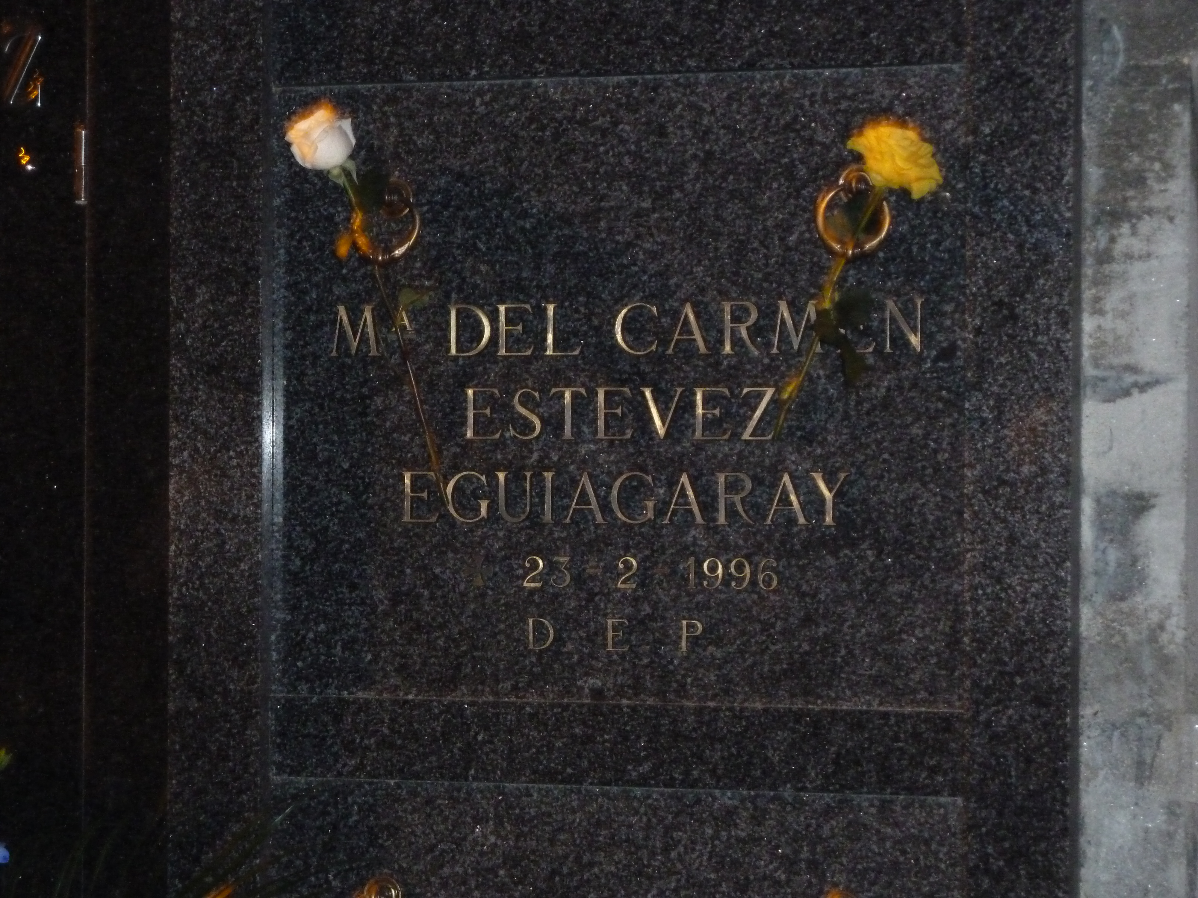 Enterro Fraga Perbes